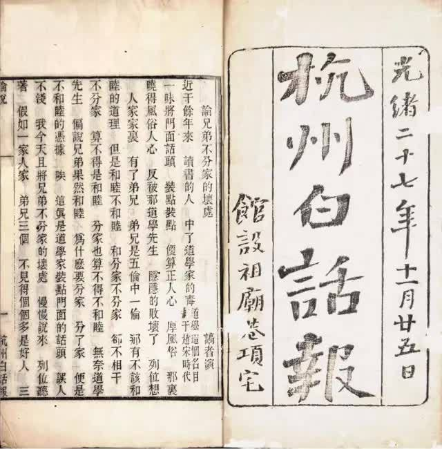 杭州白话报，光绪27年十一月廿五（1902年12月24日）